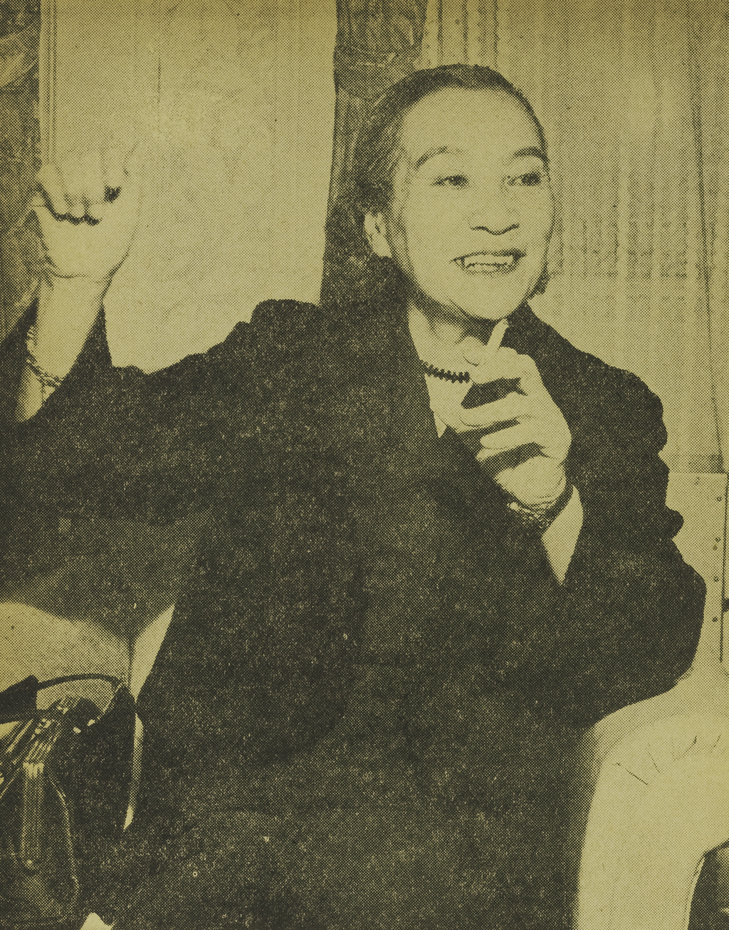 Portrait of Kamichika Ichiko (神近市子, 1888 – 1981)